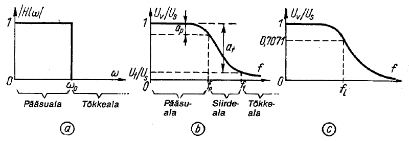 Madalpääsfiltri amplituudi-sageduse tunnusjooned: a ‒ ideaalne tunnusjoon; b ‒ reaalne tunnusjoon; c ‒ lõikesagedus fl